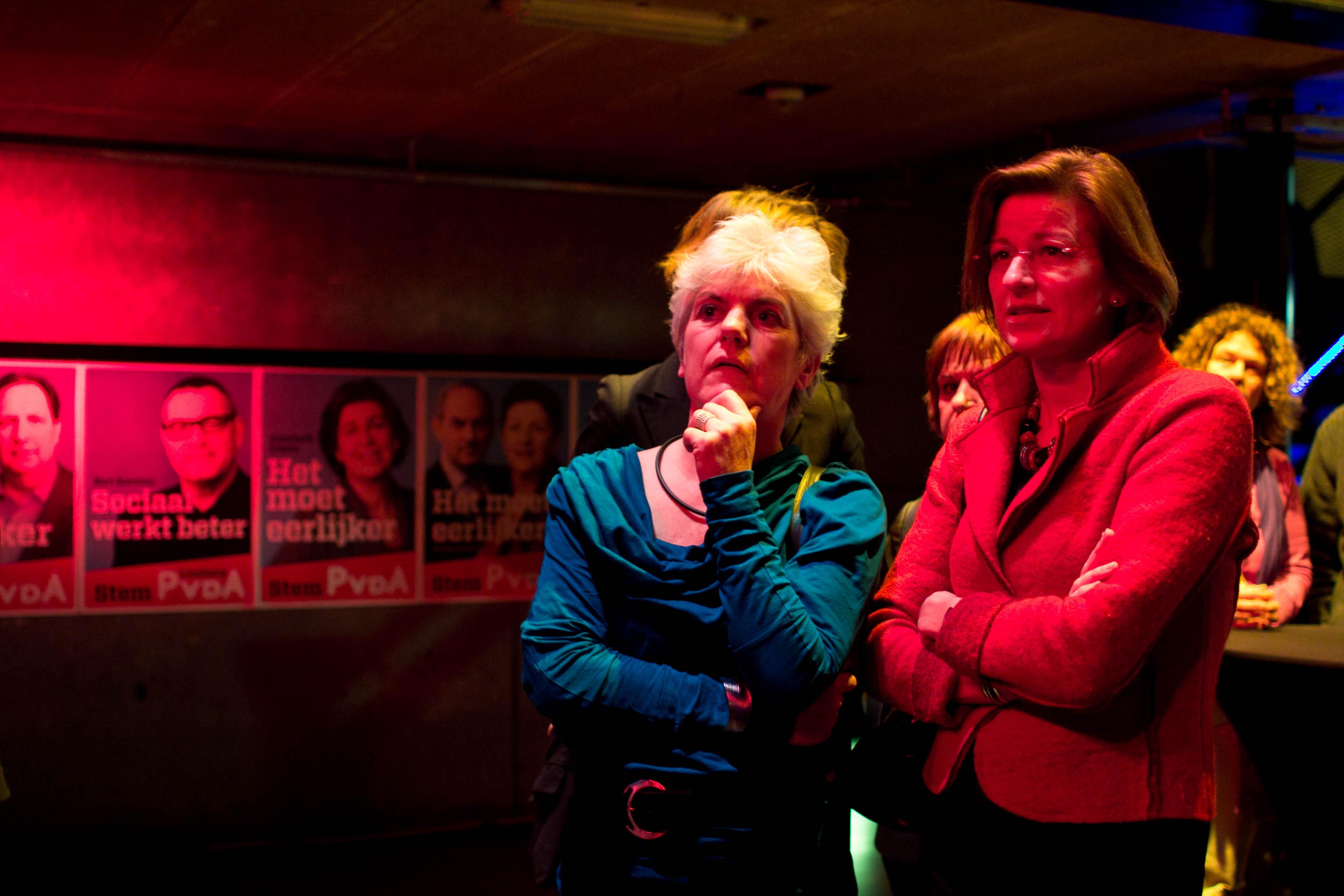 Uitslagenavond Provinciale Statenverkiezingen 2011, Ella Kalsbeek (left) and Angelien Eijsink (right)